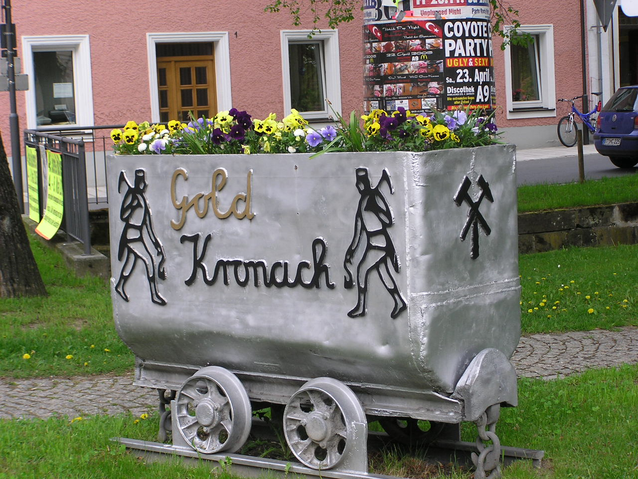 Erinnerung an den Goldbergbau in Goldkronach Fotografiert am 3. Mai 2005